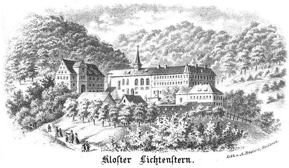 Ansicht Lichtensterns. Lithographie